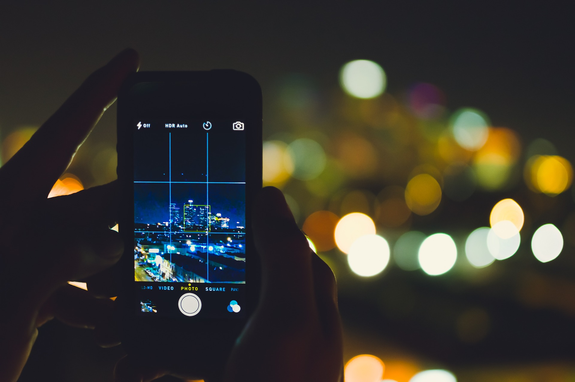 smartphone fent una foto